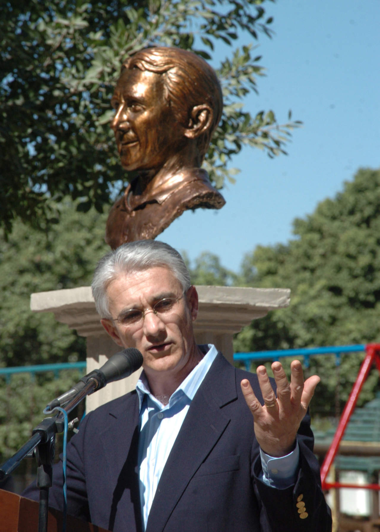 Raúl Allegre durante un homenaje en Torreón, Coahuila